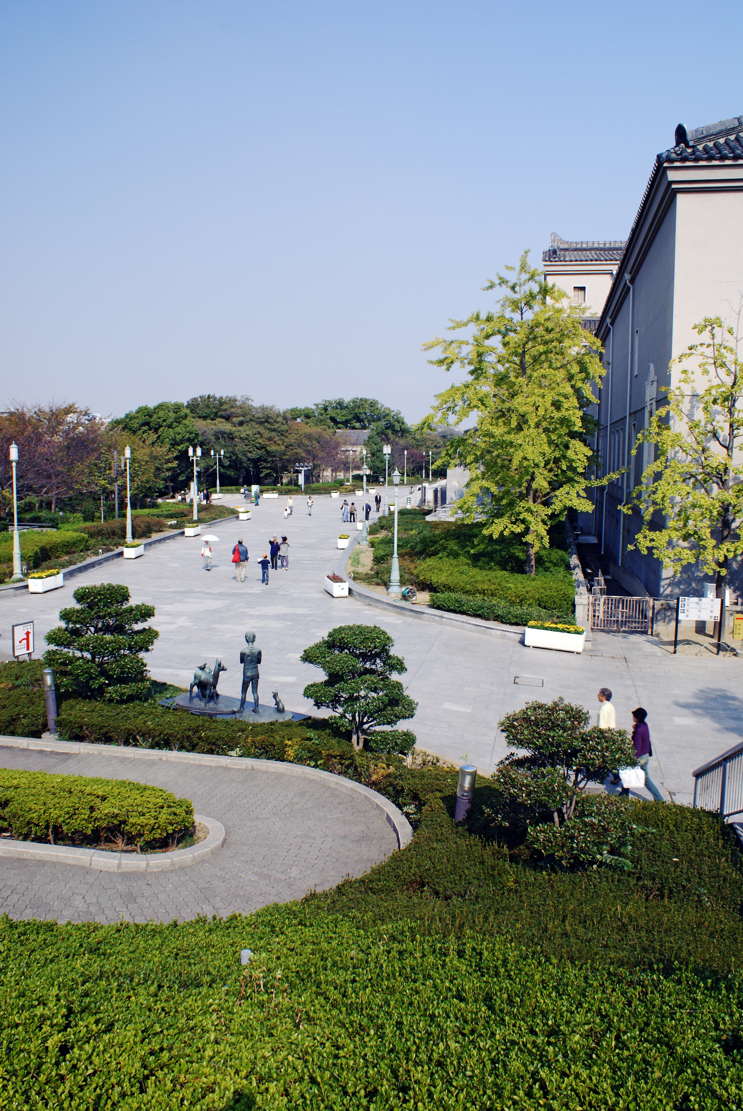 Tennoji Park in Osaka, Osaka prefecture, Japan